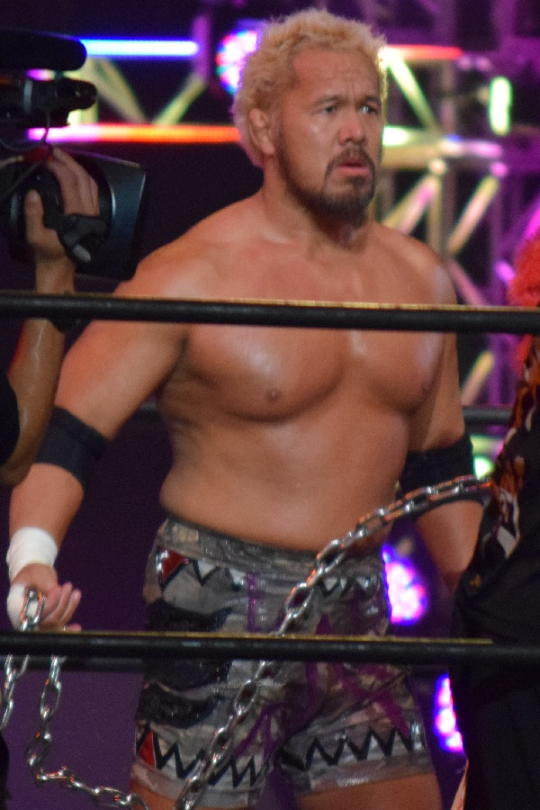 2017年2月11日 大阪府立体育会館 「THE NEW BEGINNING in OSAKA」 真壁刀義